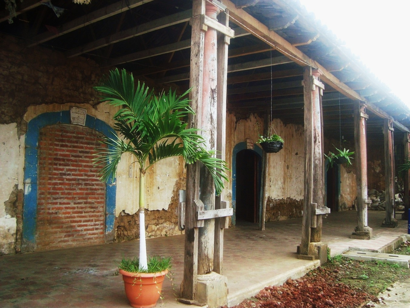 IZALCO, SONSONATE